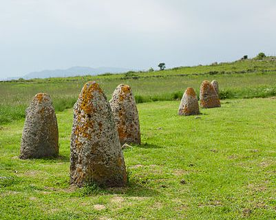 Betili di Tamuli Macomer - Sardegna - Italien